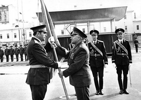 Командующий войсками Московского военного округа, начальник гарнизона Москвы генерал армии Владимир Леонидович Говоров вручает отдельному комендантскому полку Боевое Знамя и грамоту Президиума Верховного Совета СССР